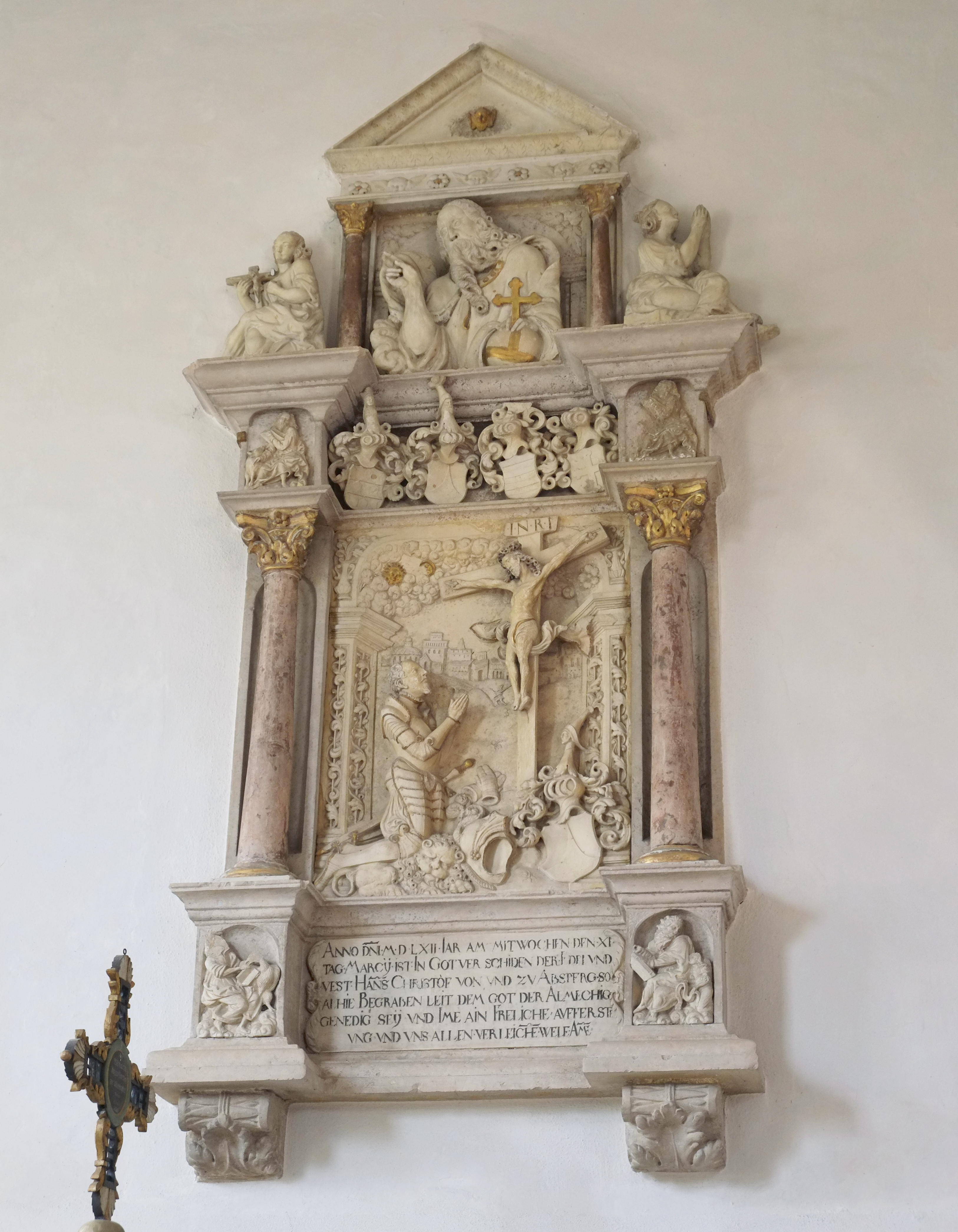 Christuskirche in Absberg im Landkreis Weißenburg-Gunzenhausen (Bayern/Deutschland)